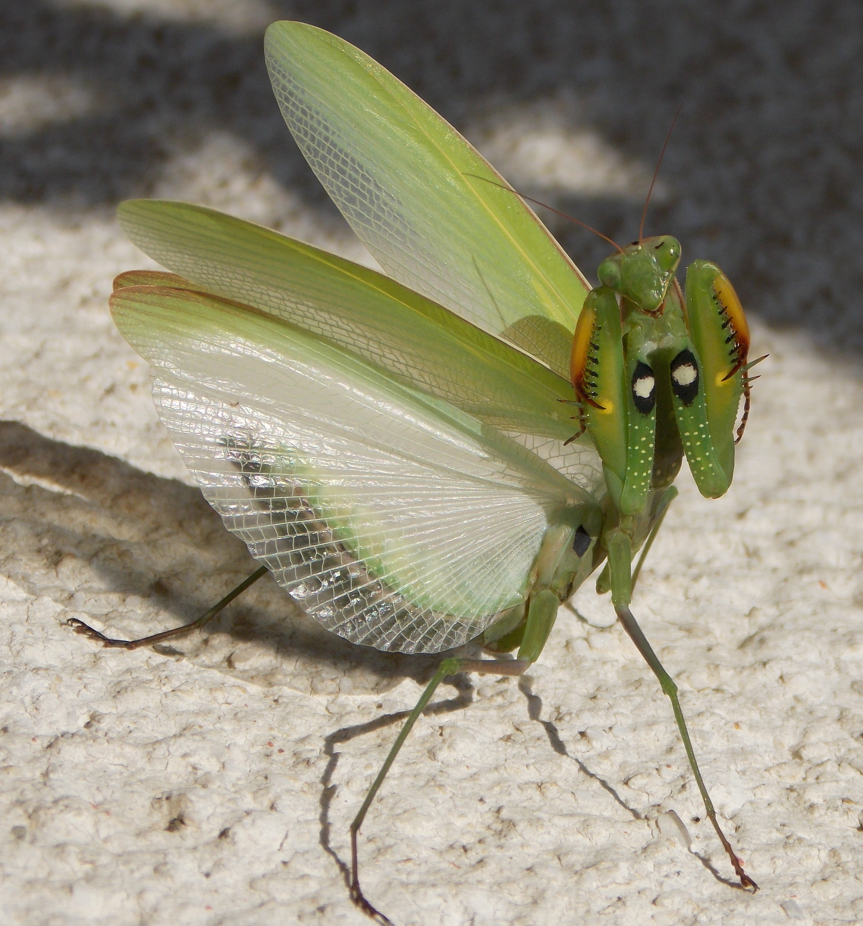 Ово је фотографија заштићеног природног добра у Србији под шифром: ПП13This is a a photo of a natural area in Serbia with ID: ПП13